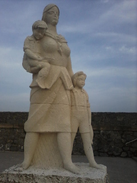 Monumento homenaje a la mujer y los hijos de los pescadores, en Guetaria, provincia de Guipúzcoa, España.